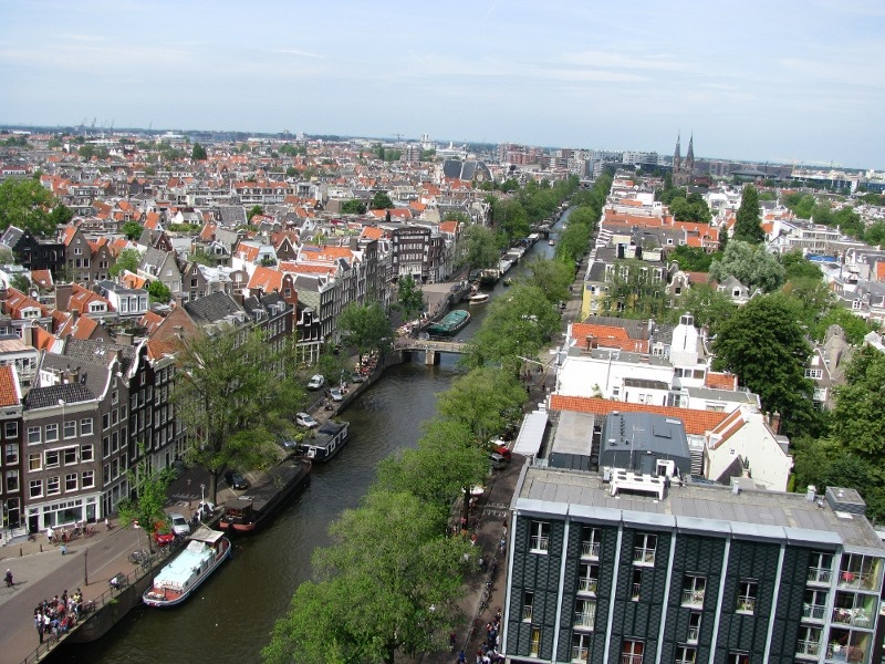 Prinsengrachtin kanava